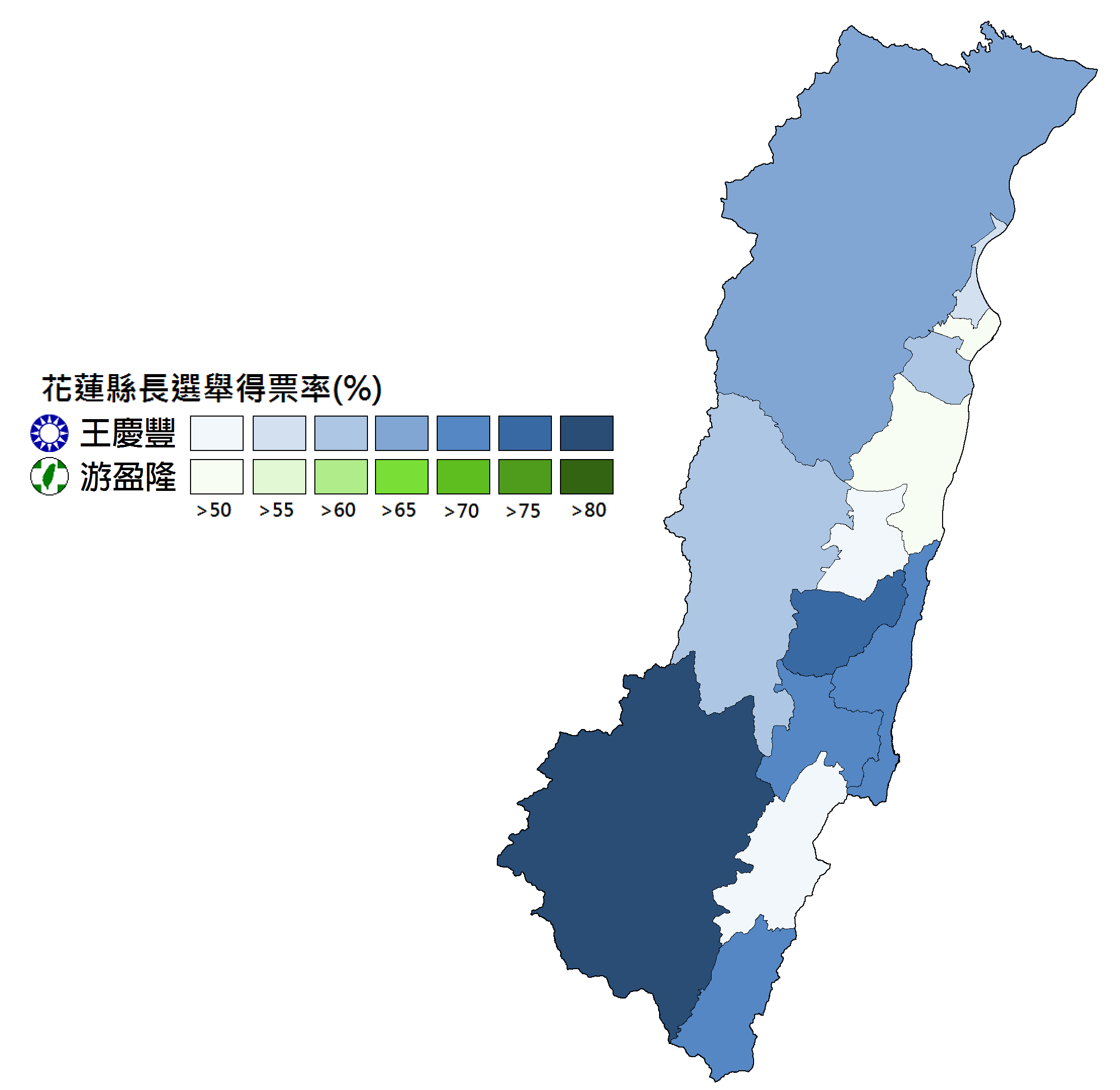 1997年花蓮縣長選舉